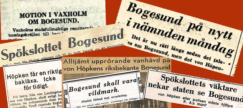 Skandalen-Lex-Bogesund tidningsrubriker